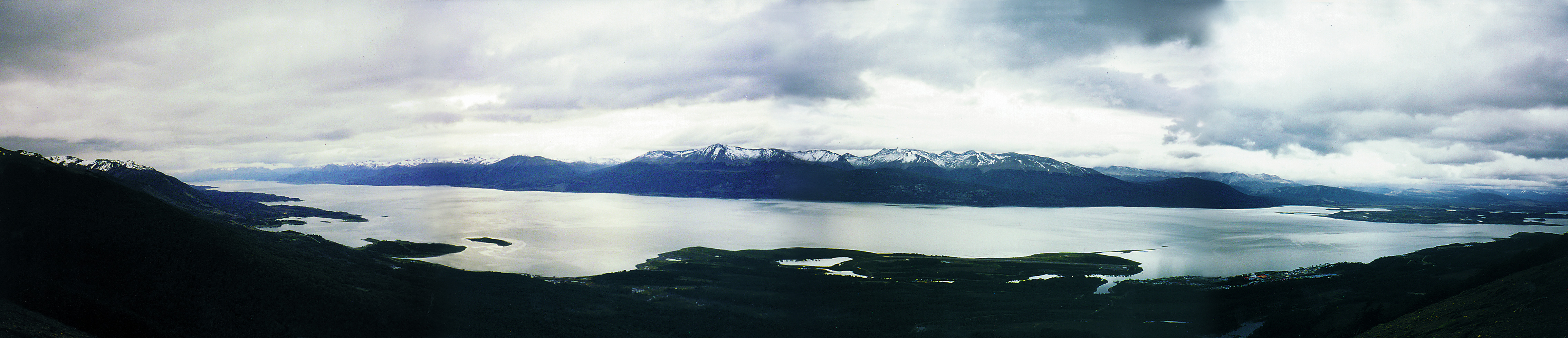 Beagle-Kanal von oberhalb Puerto Williams (rechts, unten) gesehen. Beagle Channel seen from above Puerto Williams (right, down). Canal Beagle visto desde encima de Puerto Williams (a la derecha, abajo)